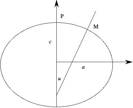 Graphique réalisé par Carlo Denis pour l'article Figure de la Terre : le sphéroïde de Clairaut. L'auteur met ce graphique dans le domaine public.